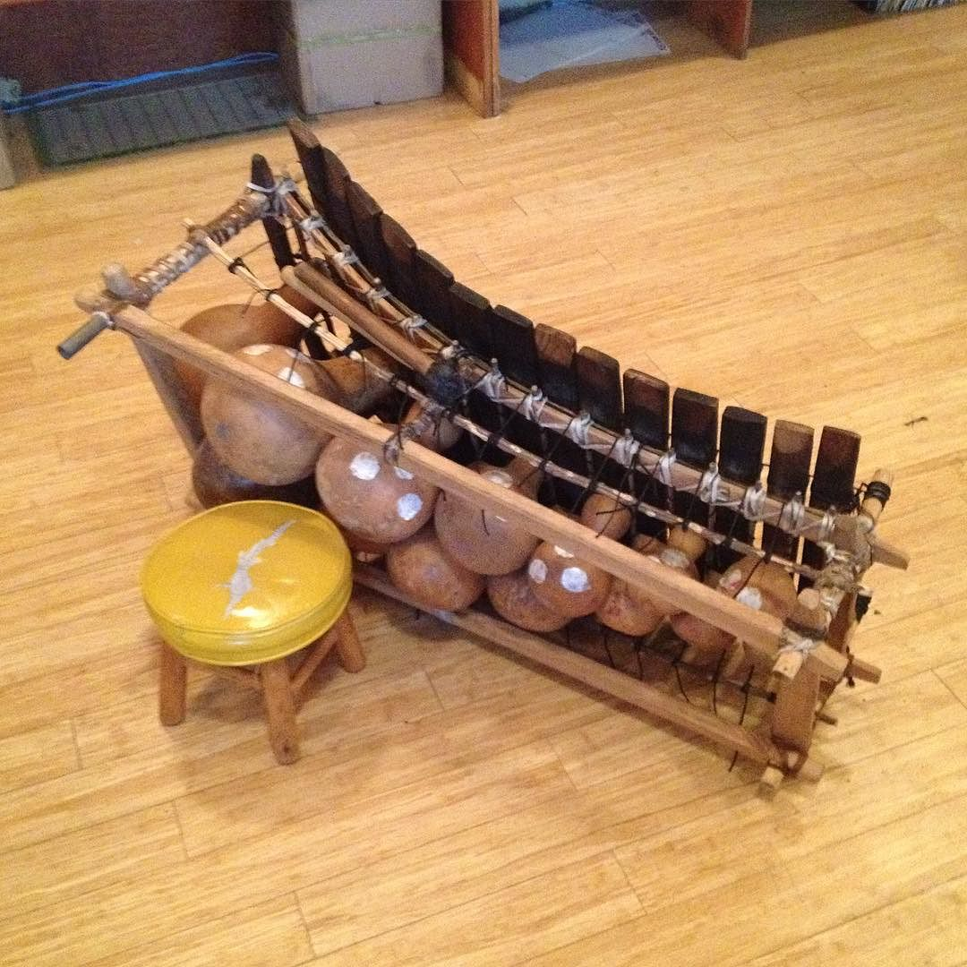 via Instagram ift.tt/1TL6FuJ